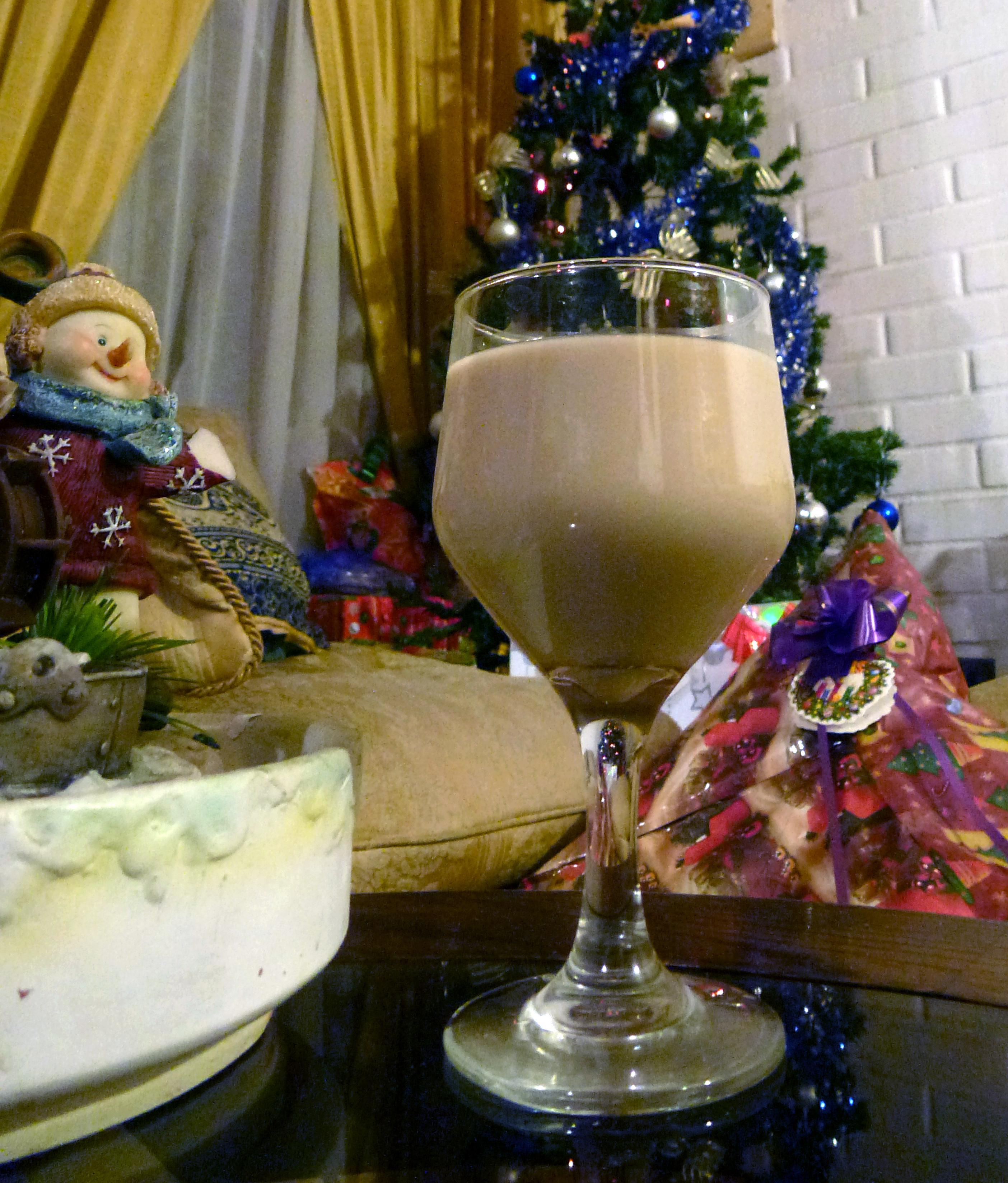 Cola de mono, cóctel chileno tradicional de Navidad.